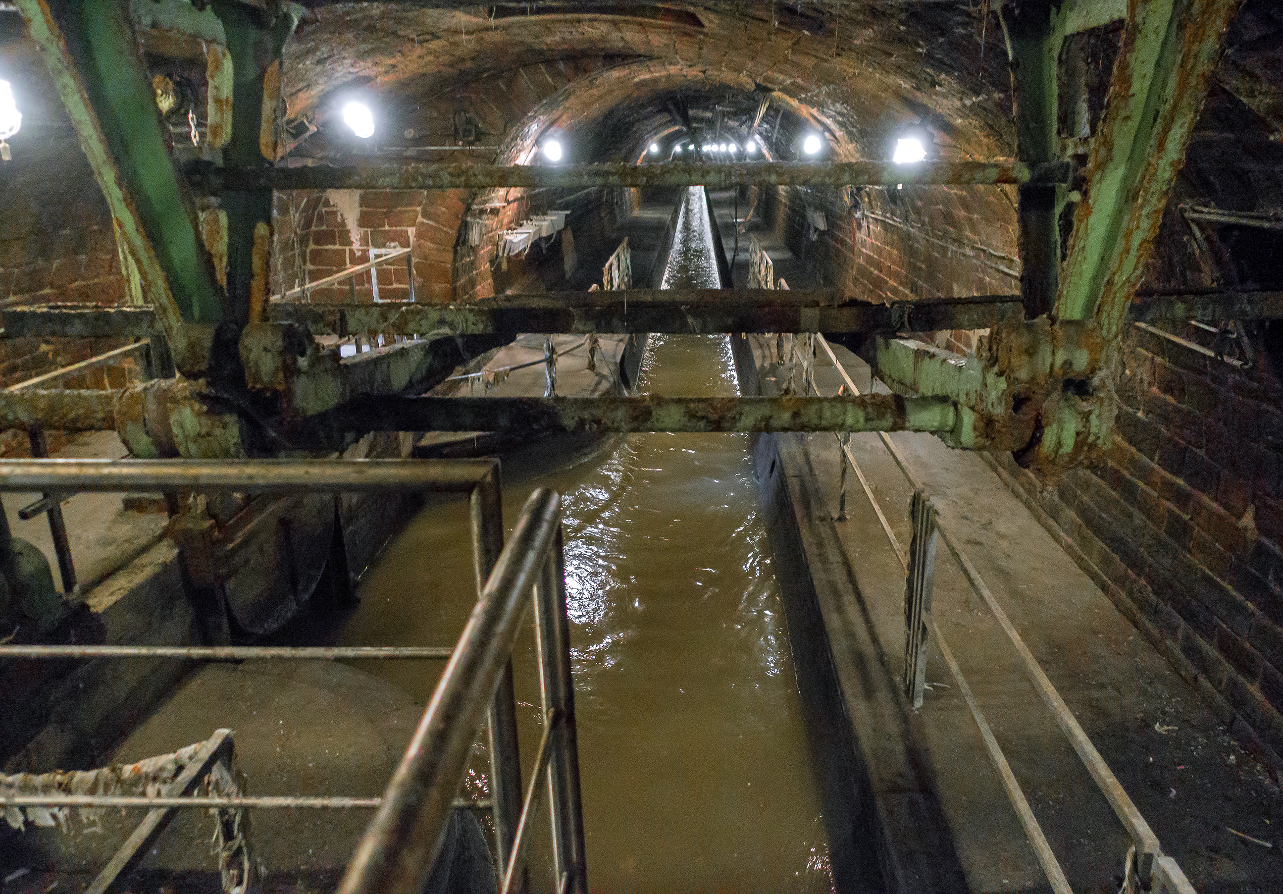 Landgraben Karlsruhe, Einstiegspunkt Lameyplatz, Blick auf das über 100 Jahre alte gusseiserne Wehr